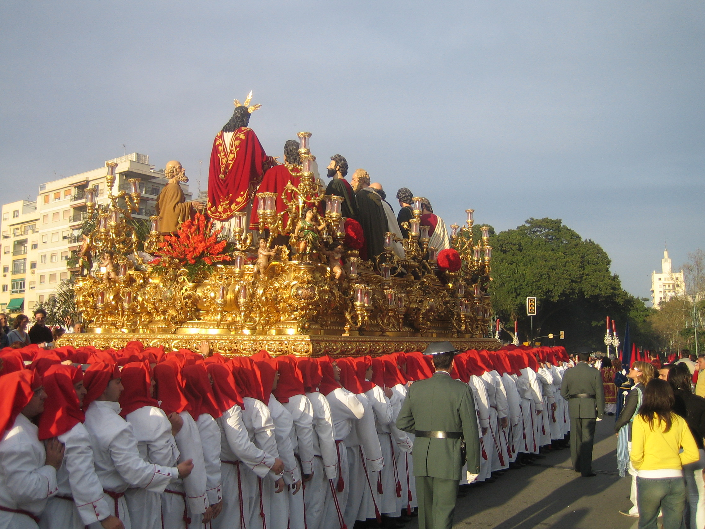 Cofradia de la Cena, Malaga, a su entrada a la alameda en el recorrido oficial